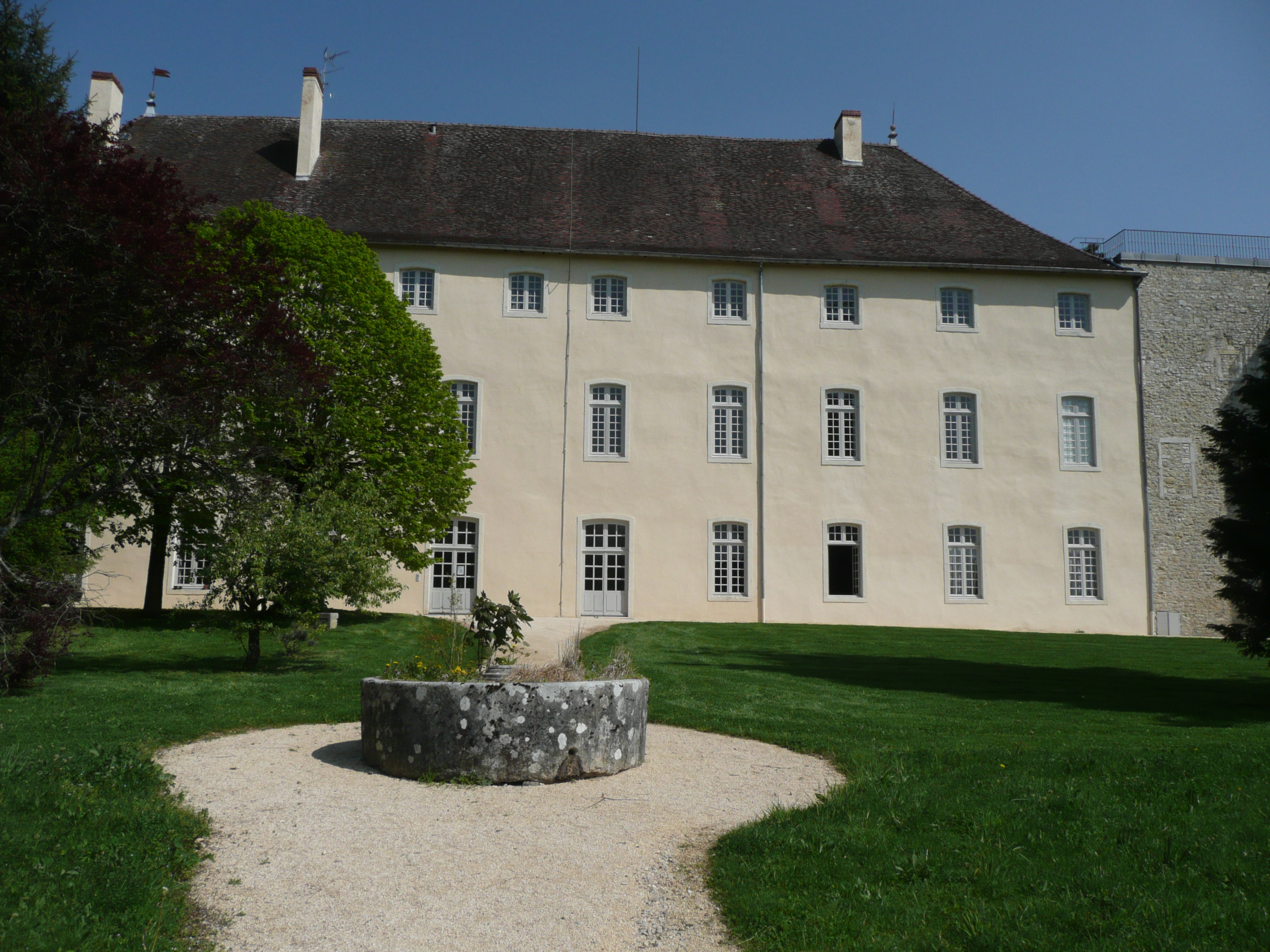 Une vue de devant du chateau de Pont d'Ain